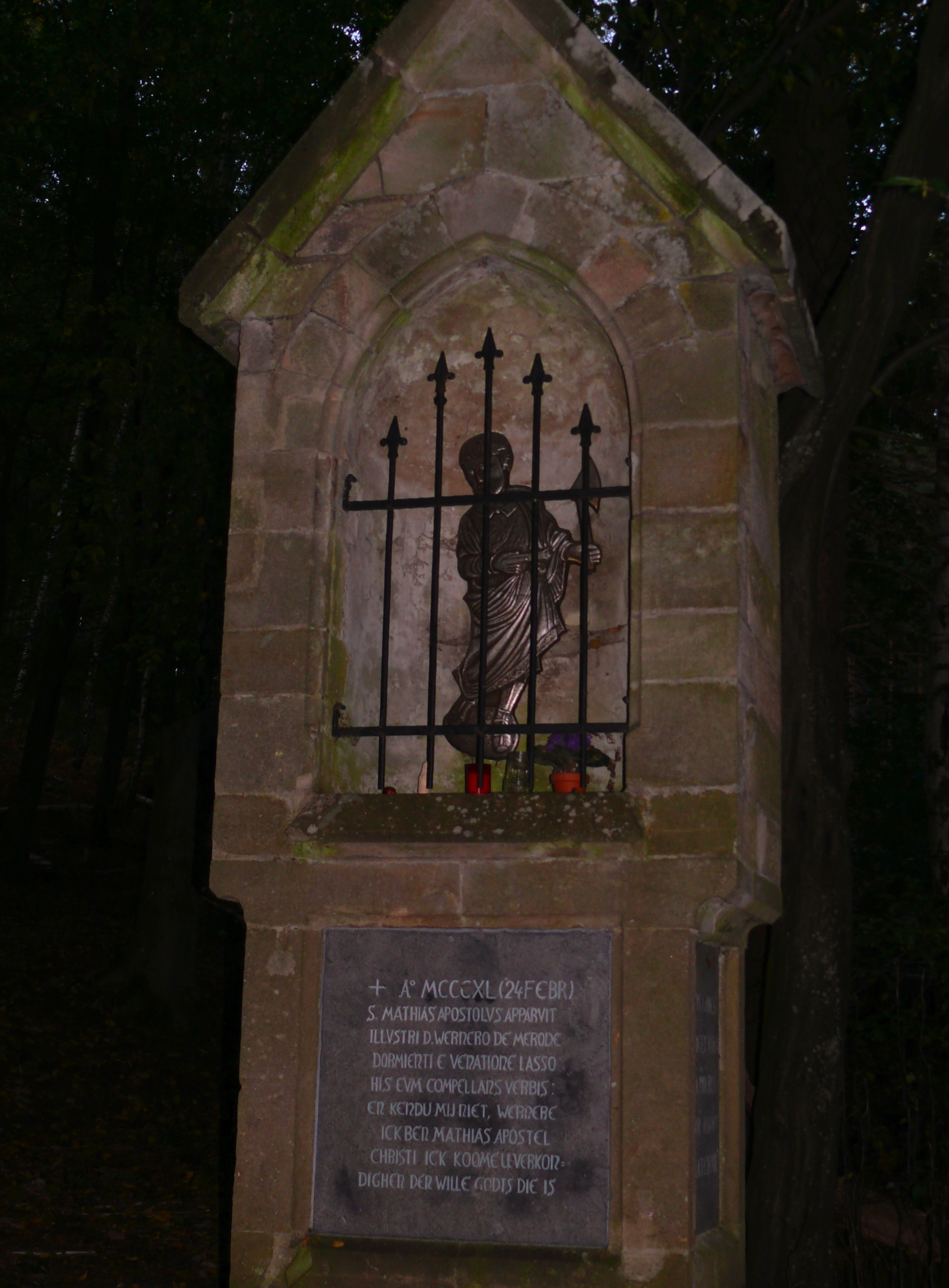 Gedenkstein am Kloster Schwarzenbroich zwischen Schevenhütte und Düren im Hürtgenwald. Laut einer Infotafel ist er diesem Text beschriftet: Übersetzung der Inschrift der Tafel: Im Jahre 1340 erschien der Apostel Matthias dem erlauchten Herrn Werner von Merode als dieser von der Jagd ermüdet schlief; er sprach zu ihm folgende Worte: Kennt Ihr mich nicht Werner? Ich bin Matthias der Apostel Christi, ich komme, Euch den Willen Gottes zu verkünden. Ihr sollt an dieser Stelle mir zu Ehre eine Kirche bauen und ein Kloster, in welchem Mönche aus dem Orden, in dem diese hier in ihrem Leben gewesen sind, Gott und mir dienen. So erzählt die Chronik des Ordens. Heinrich, Graf von Merode und seine Gemahlin Nathalie (?) Prinzessin von Croy erneuerten dieses Denkmal im Jahre 1896